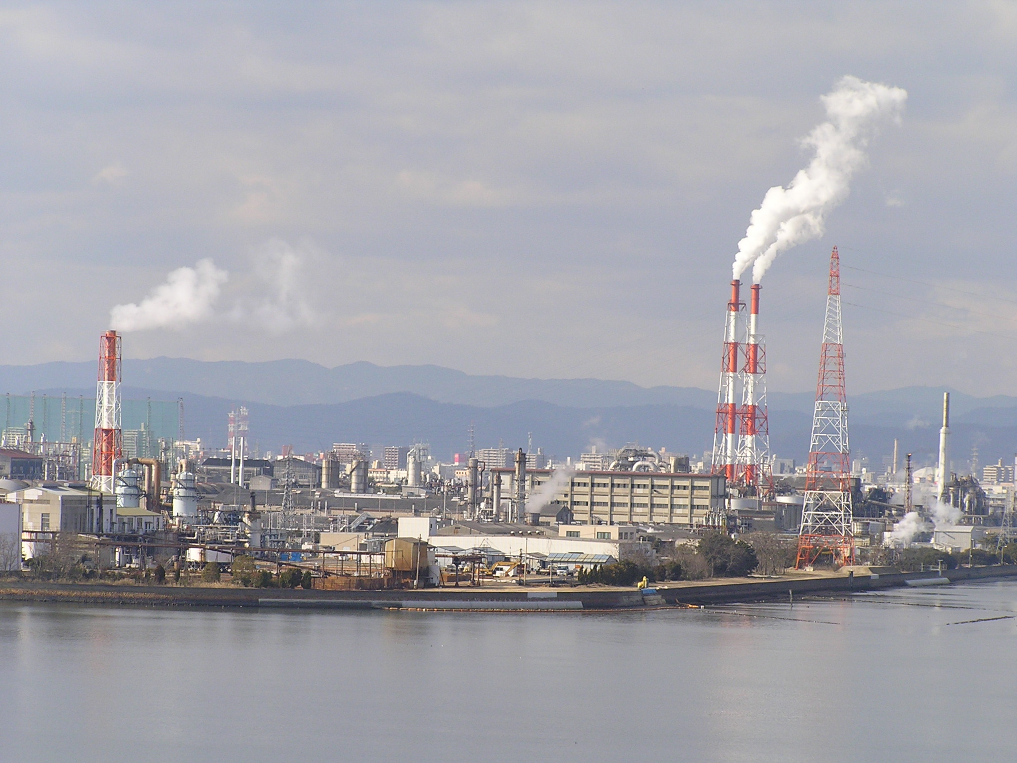 Okayama City Kounan industrial zone